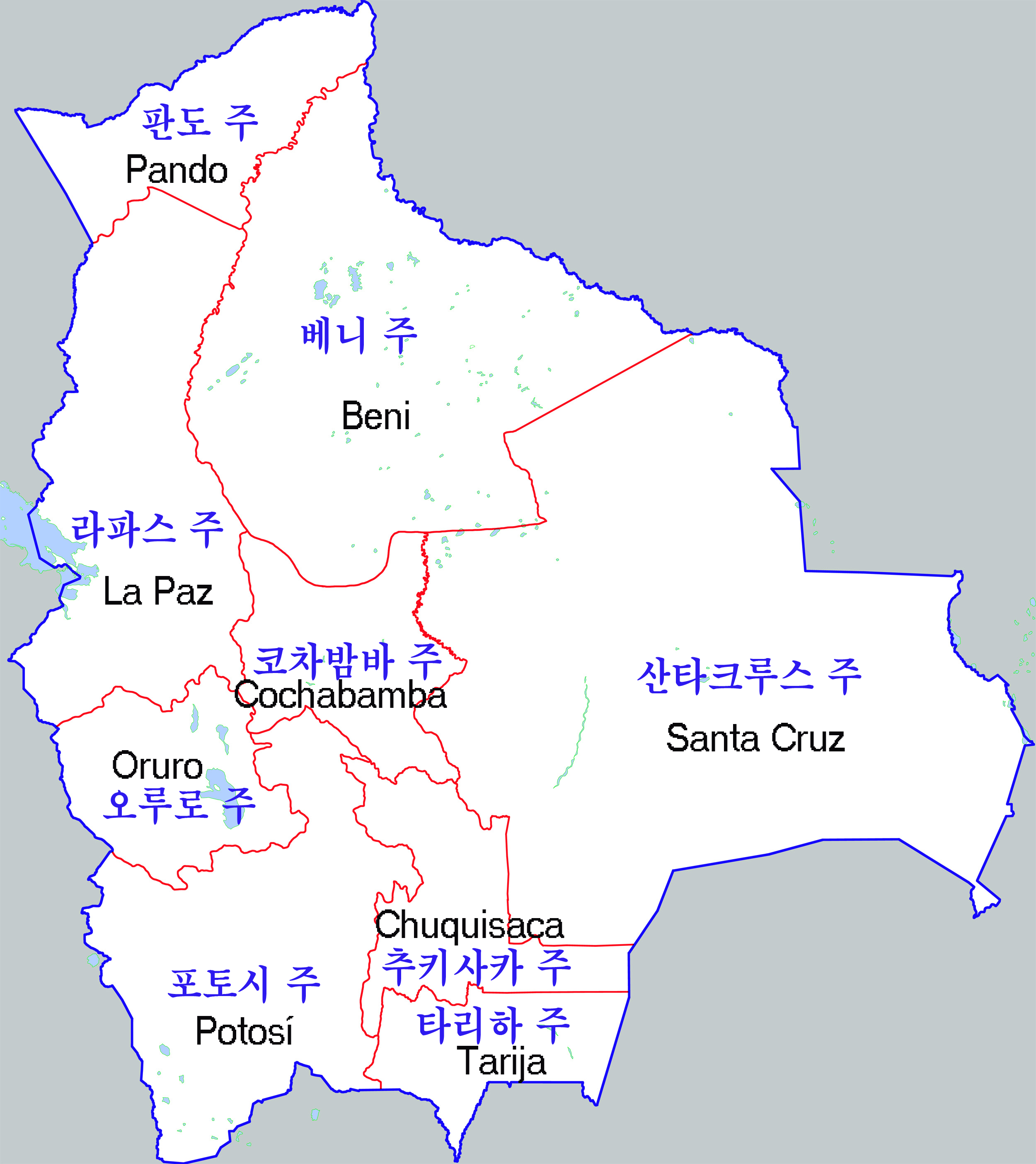 볼리비아 행정구역